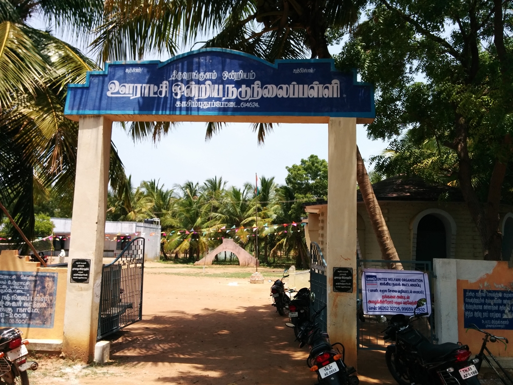 ஊராட்சி ஒன்றிய நடுநிலைப்பள்ளி- நுழைவாயில் India